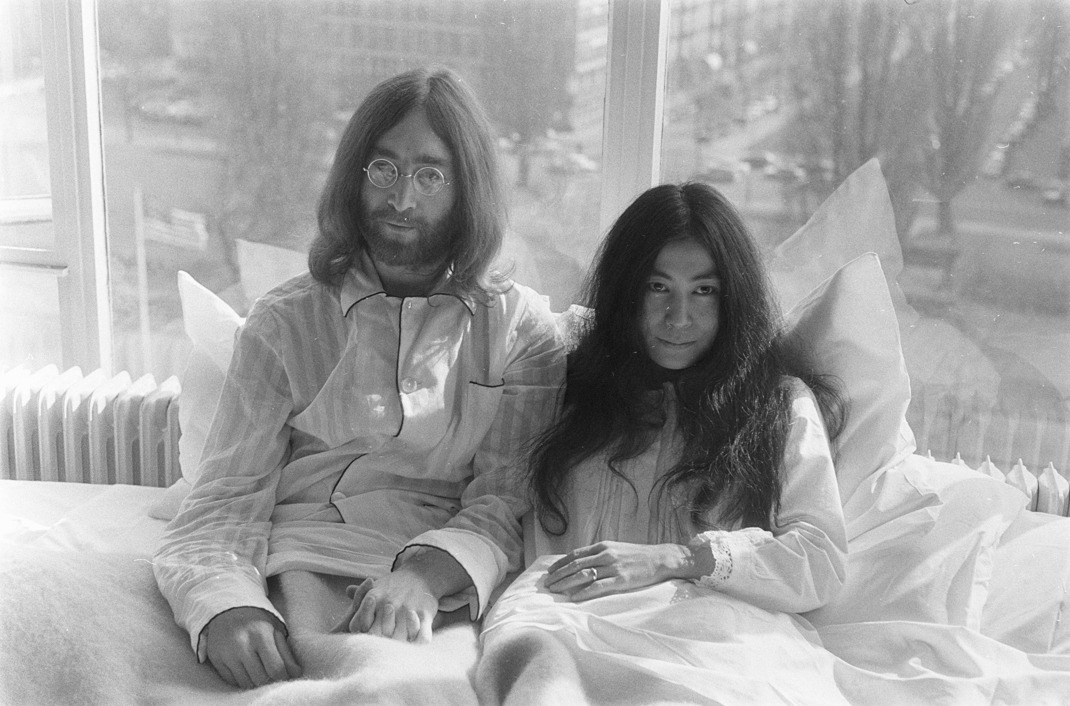 Collectie / Archief : Fotocollectie Anefo Reportage / Serie : [ onbekend ] Beschrijving : John Lennon en zijn echtgenote Yoko Ono op huwelijksreis in Amsterdam. John Lennon en Yoko Ono in bed in het Hilton Hotel Datum : 25 maart 1969 Locatie : Amsterdam, Noord-Holland Trefwoorden : hotels, huwelijksreizen, musici, muziek, zangers Persoonsnaam : Lennon, John, Ono, Yoko Fotograaf : Koch, Eric / Anefo Auteursrechthebbende : Nationaal Archief Materiaalsoort : Negatief (zwart/wit) Nummer archiefinventaris : bekijk toegang 2.24.01.05 Bestanddeelnummer : 922-2305